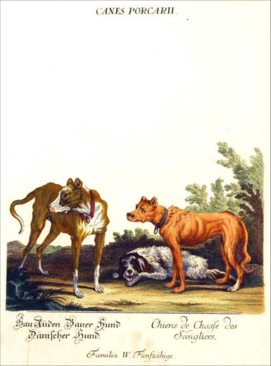 Håndmalet tryk (28 x 45 cm) fra Johann Jakob Ridinger og Martin Elias Ridinger (1720-80)'s ”Thierreich” (Thierbuch), Augsburg, 1768. (Handkolorierter Kupferstich auf Honig-Bütte). De to brødre var sønner af den absolut førende kunstner i jagtafbildninger i samtidens Germanien, Johann Elias Ridinger (Ulm 1698-1767 Augsburg). Brødrene videreførte faderens bogtrykkeri efter dennes død 1767.